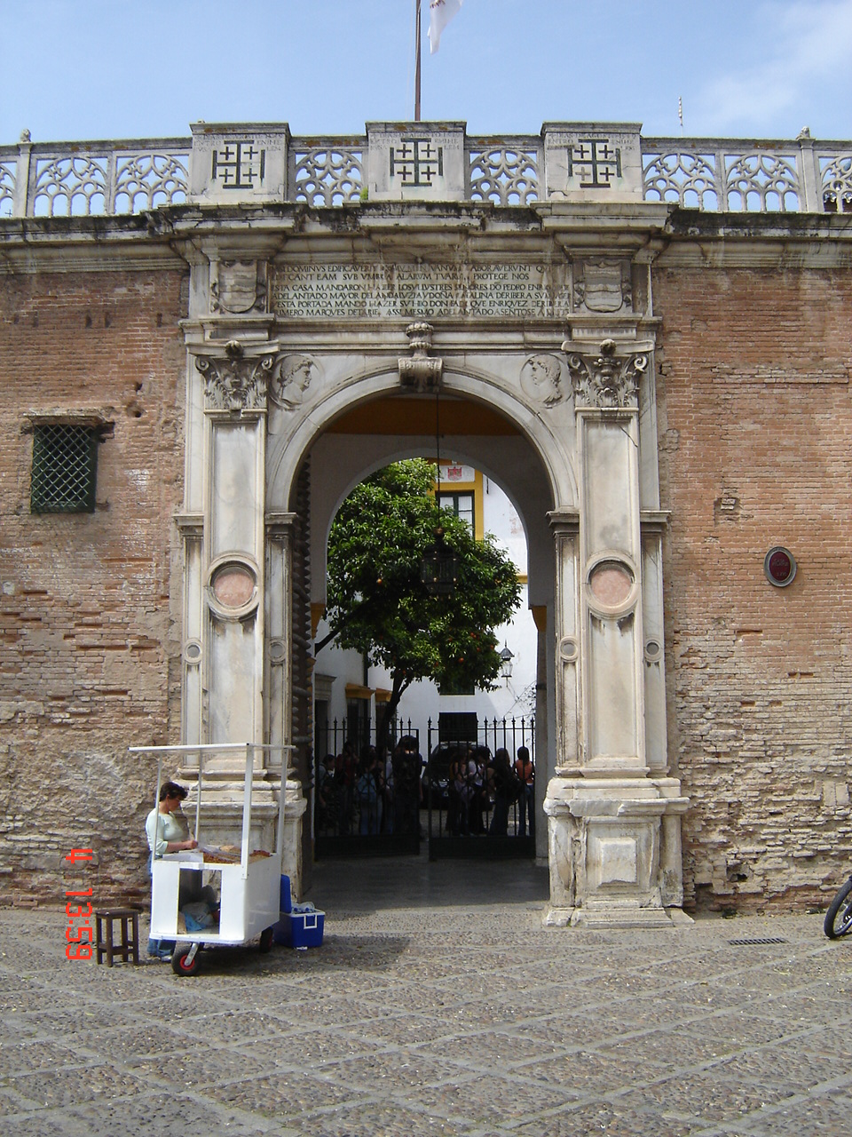 Entrada principal a palacio-museo "Casa de Pilatos" de Sevilla (España)